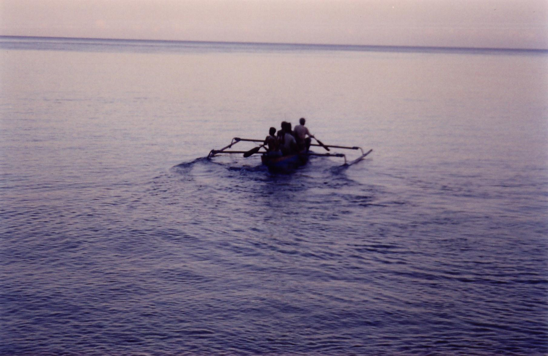 Mehara Sea